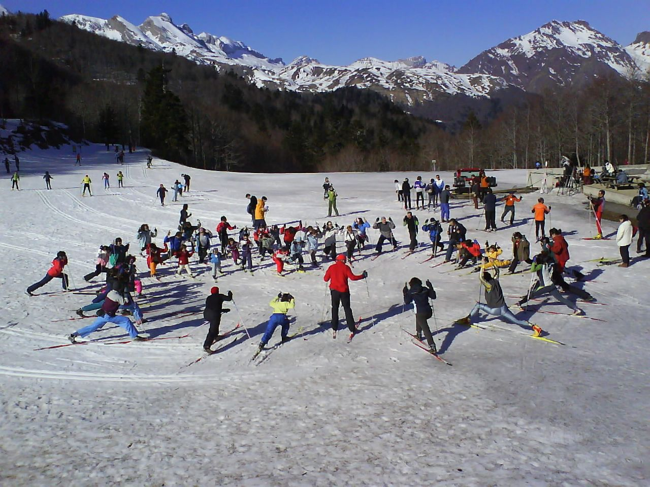 Egizu Getxo euskaldun taldeak antolatutako irteera